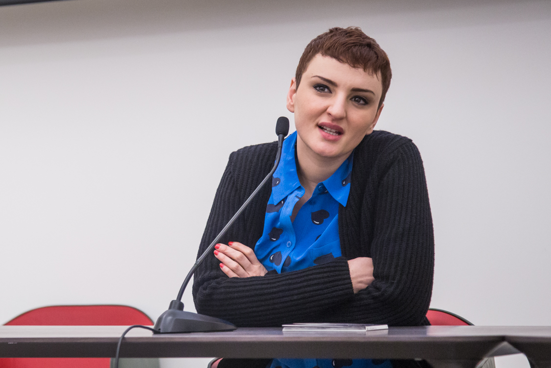 Arisa a Milano nel 2016 in occasione dell'instore di Guardando il cielo